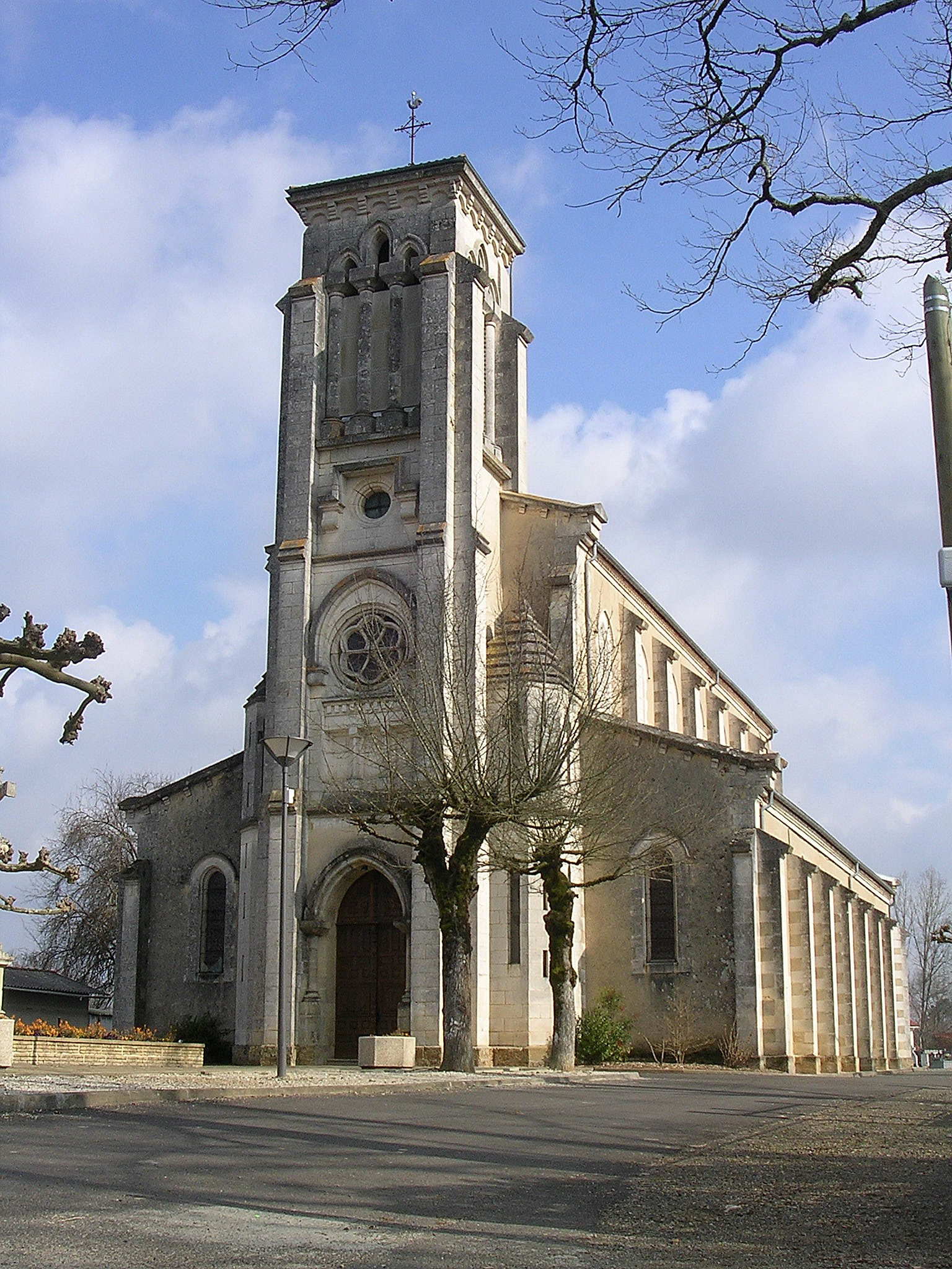 Façade de l'église Saint-Jean-Baptiste de Benquet, dans le département français des Landes